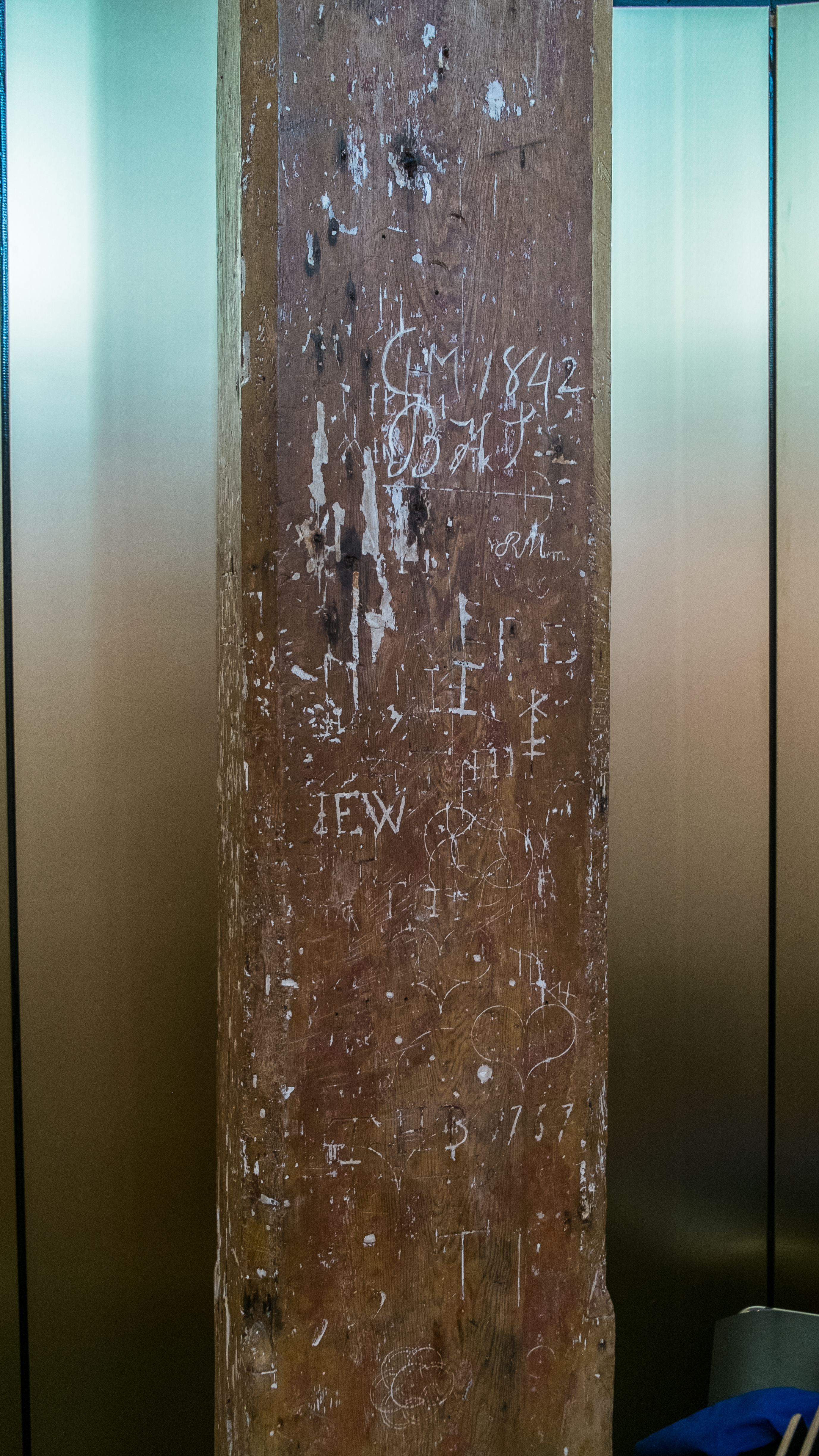 tekeningen op de standvink achter in het schip (voor de 'gouden kubus') van de kerk van Leegkerk